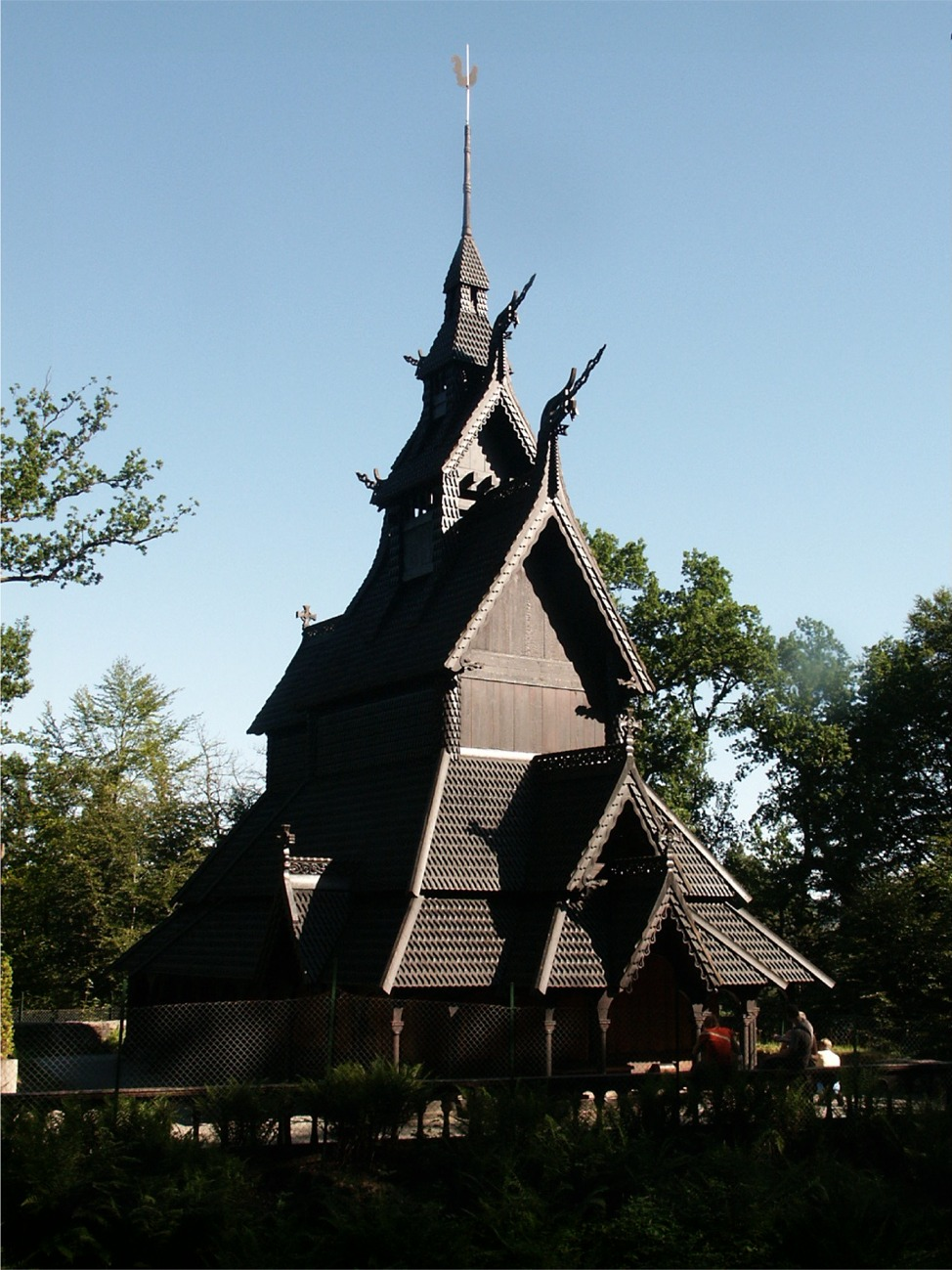 Stav Church Fantoft, Bergen